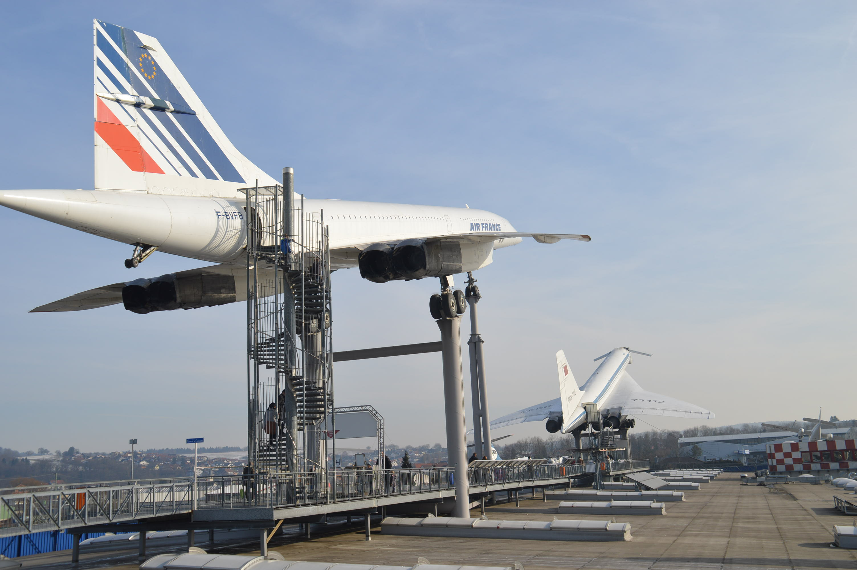 Die Concorde F-BVFB der Air France neben einer Tupolew Tu-144